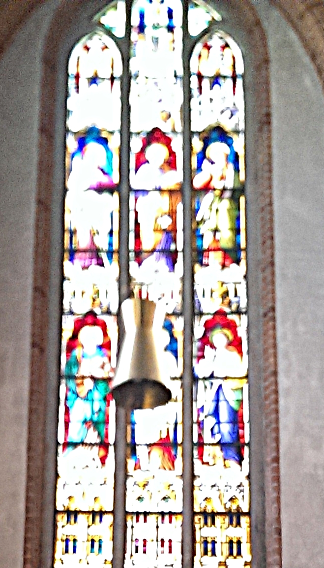 Farbige Fenster stellen Szenen aus dem Leben der zwölf Apostel dar.